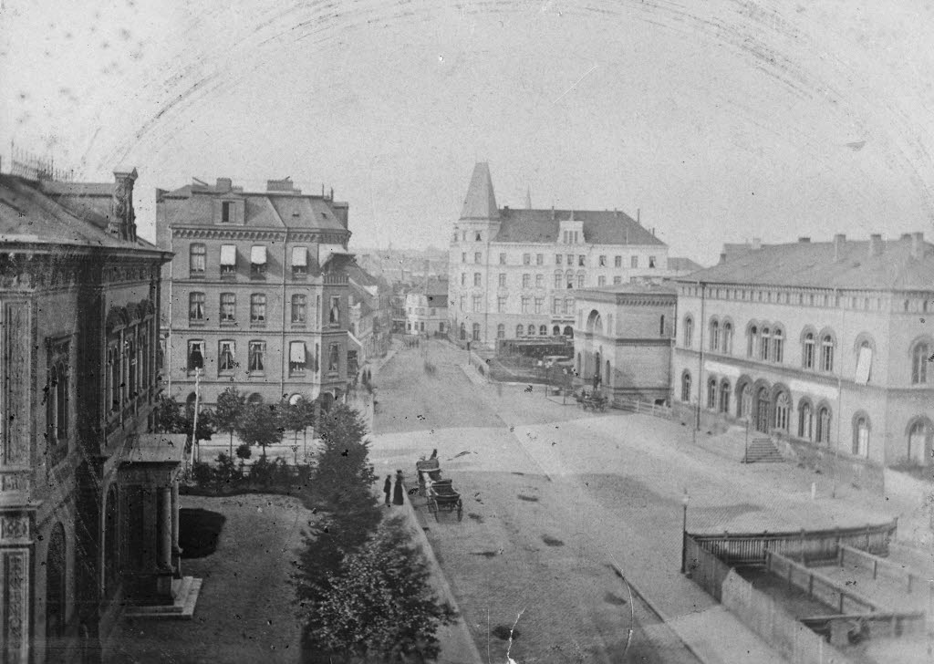 Blickrichtung Altstadt. Im Bild rechts der Bahnhof. Im Hintergrund rechts das Hotel Germania.